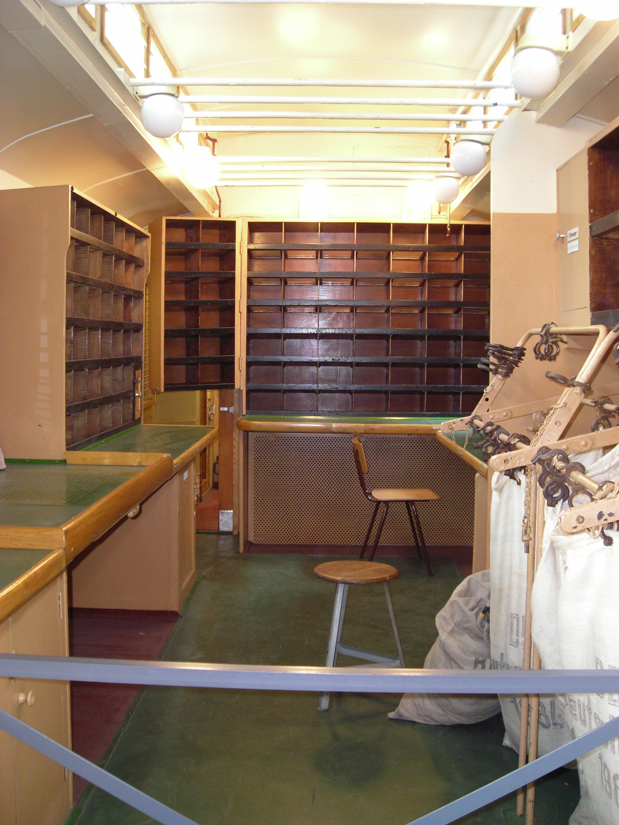 Bahnpostwagen für Personenzüge, Nr. 4467 (Hersteller: Christoph & Unmack AG, Baujahr 1933): Innenraum, zuletzt verwendet als Bahnpostamt 32 Leipzig. Exponat im Deutschen Museum Verkehrszentrum, Halle 2, Inv.-Nr. L2006-8 (Leihgabe des Museums für Kommunikation in Nürnberg)